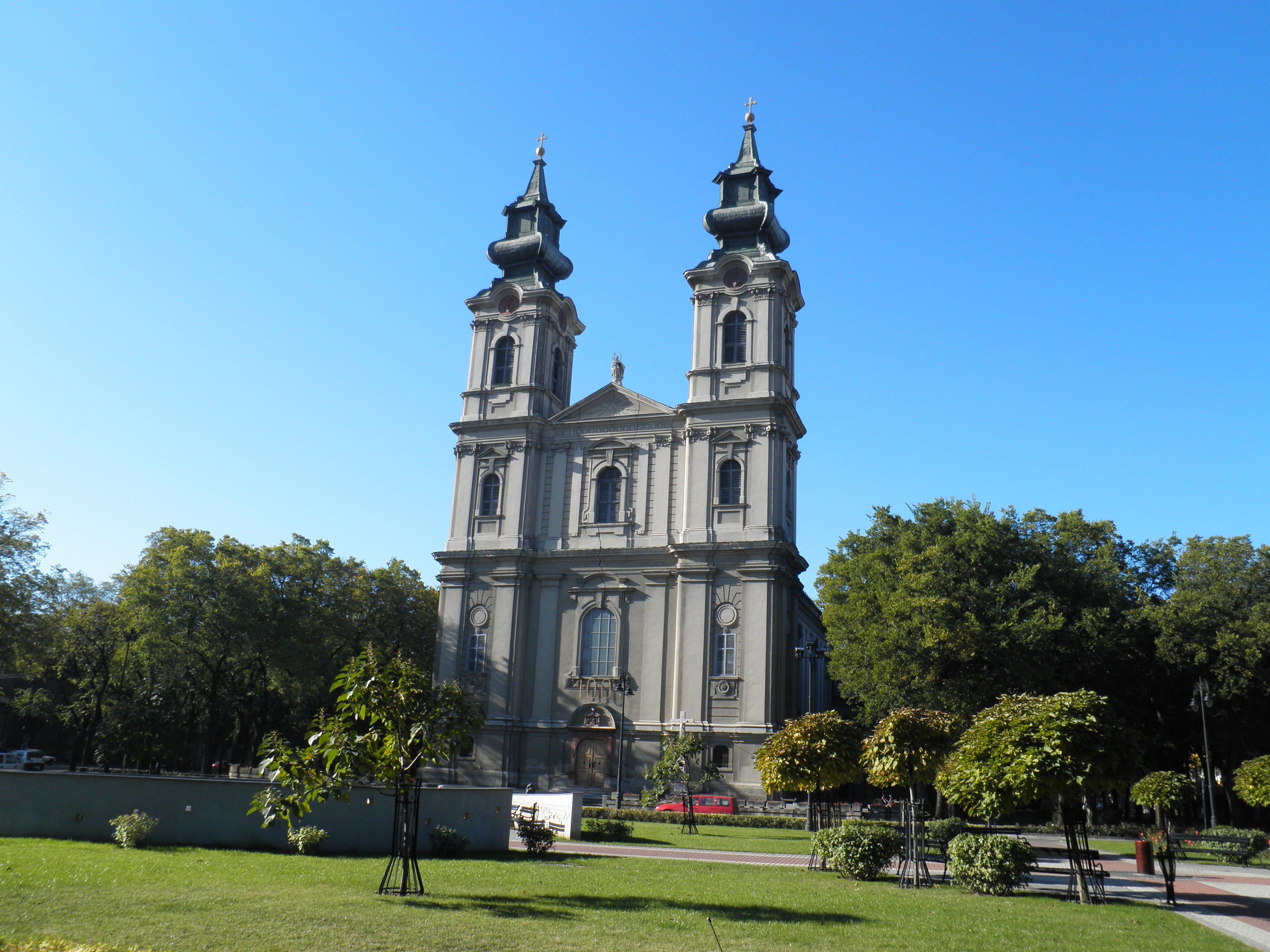 Katedrala Svete Tereze Avilske